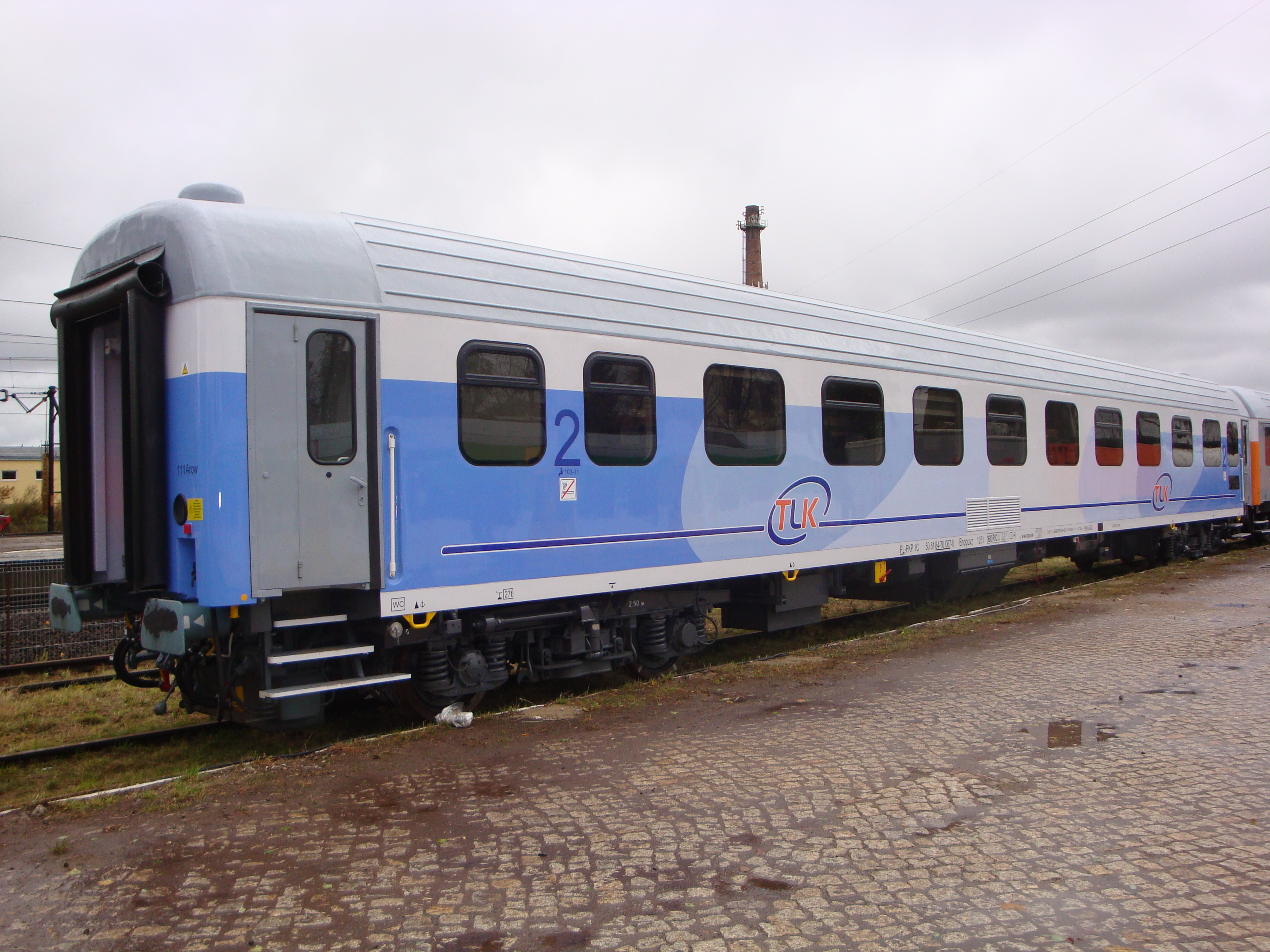 Zmodernizowany wagon Bnopuvz w nowym malowaniu TLK zaprezentowany przez PKP Intercity podczas targów kolejnictwa "Trako" w Gdańsku.